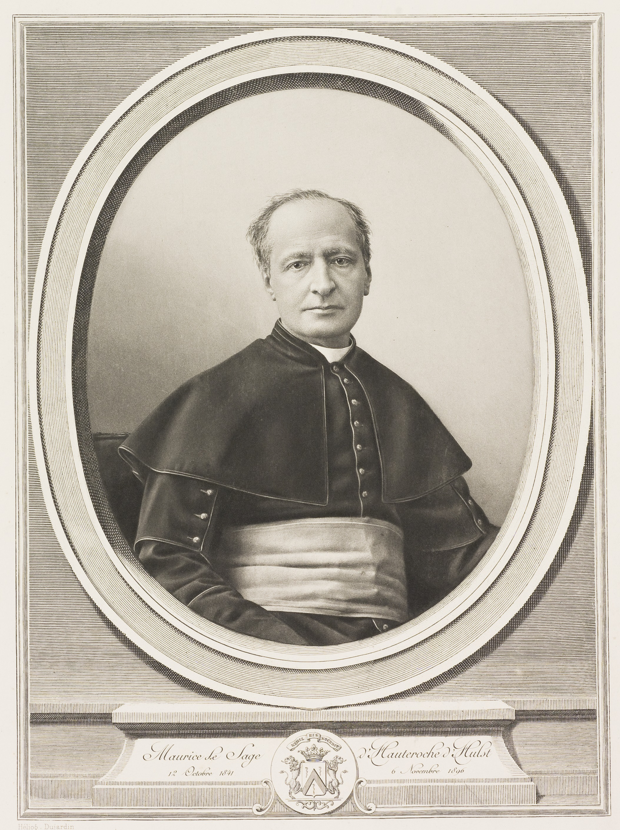 Maurice Le Sage d'Hauteroche d'Hulst (1841-1896)